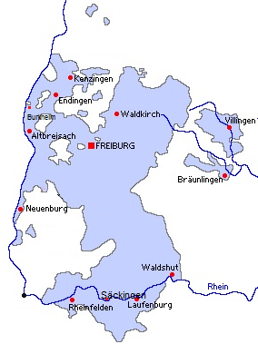 Kartenskizze Breisgau